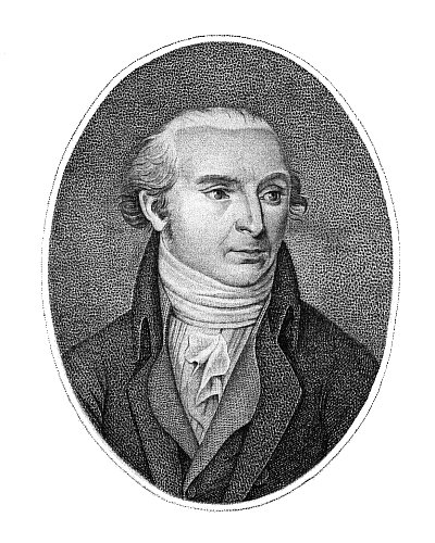 Portrait Hans von Held (1764-1842)